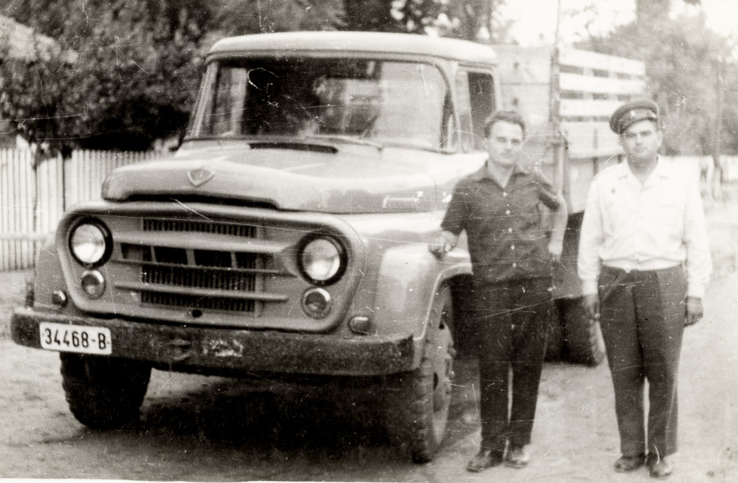 Ion Lupășteanu (dreapta) cu un bărbat lîngă un camion (Autocamion Setagul Rosu SR 113 Bucegi) din colecția personală Pîslaru Bogdan Cosmin